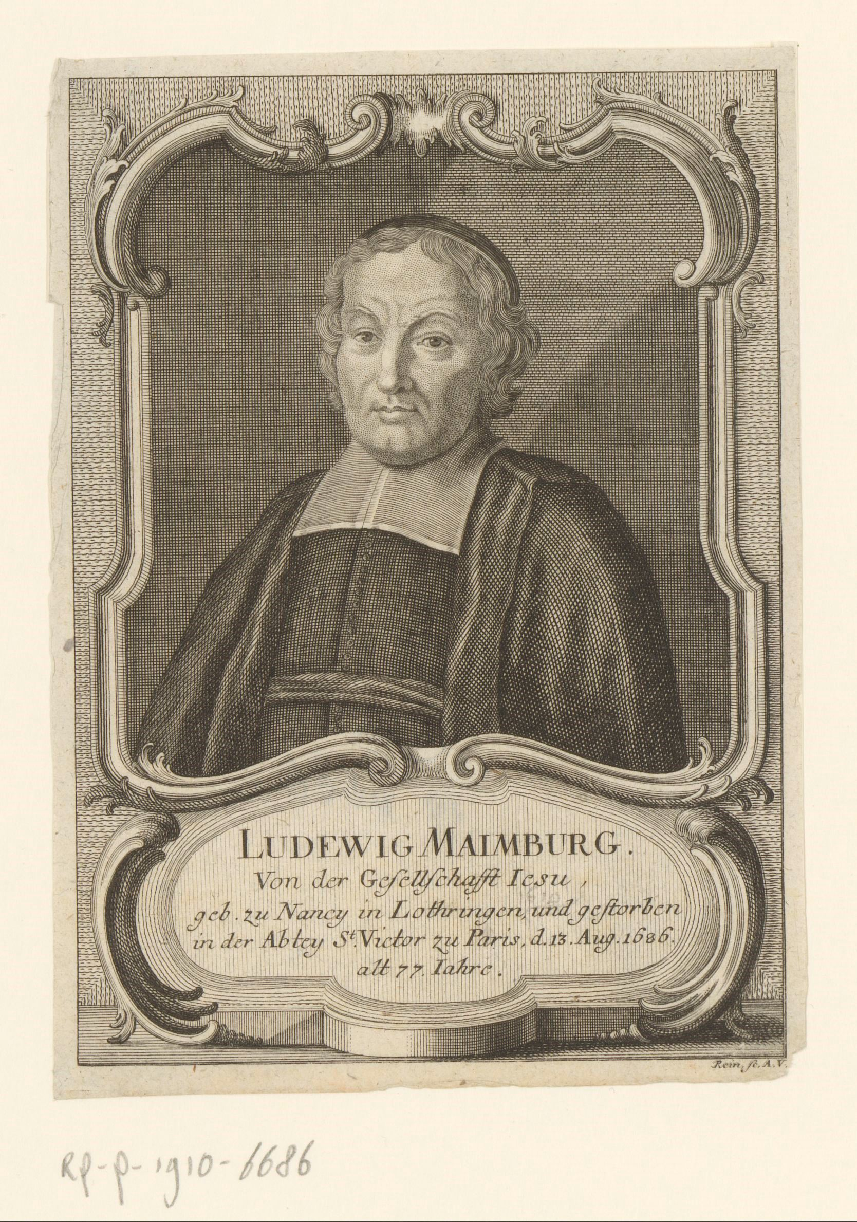 IdentificatieTitel(s): Portret van Louis MaimburgObjecttype: prent Objectnummer: RP-P-1910-6686Opschriften / Merken: verzamelaarsmerk, verso, gestempeld: Lugt 2228VervaardigingVervaardiger: prentmaker: Melchior Rein (vermeld op object)Datering: 1686 - 1778Fysieke kenmerken: gravureMateriaal: papier Techniek: graveren (drukprocedé)Afmetingen: blad: h 172 mm (binnen de plaatrand afgesneden) × b 125 mm (binnen de plaatrand afgesneden)OnderwerpWat: historical personstheologianWie: Louis MaimburgVerwerving en rechtenVerwerving: aankoop 1905Copyright: Publiek domein